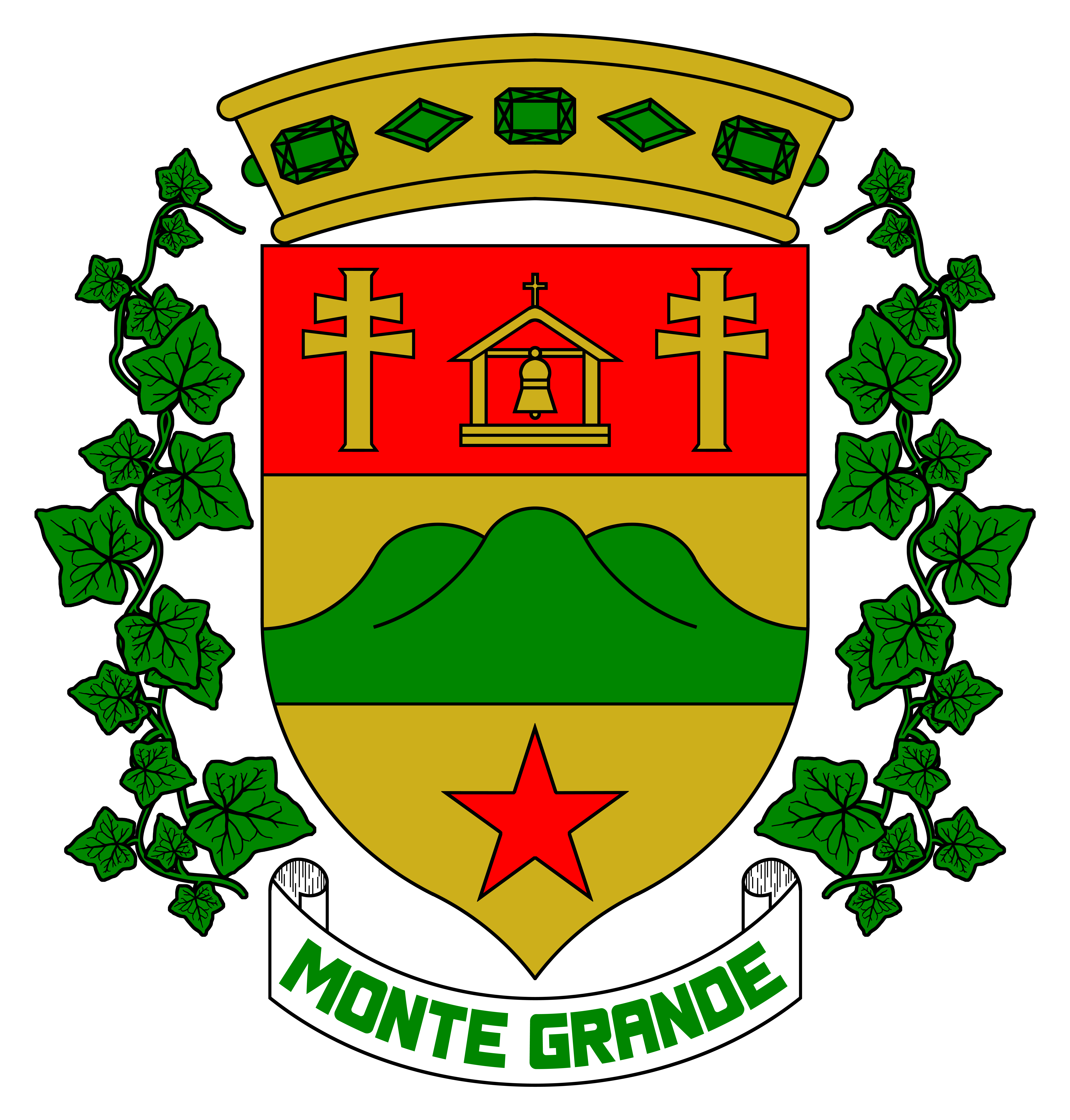 Escudo del Barrio Monte Grande